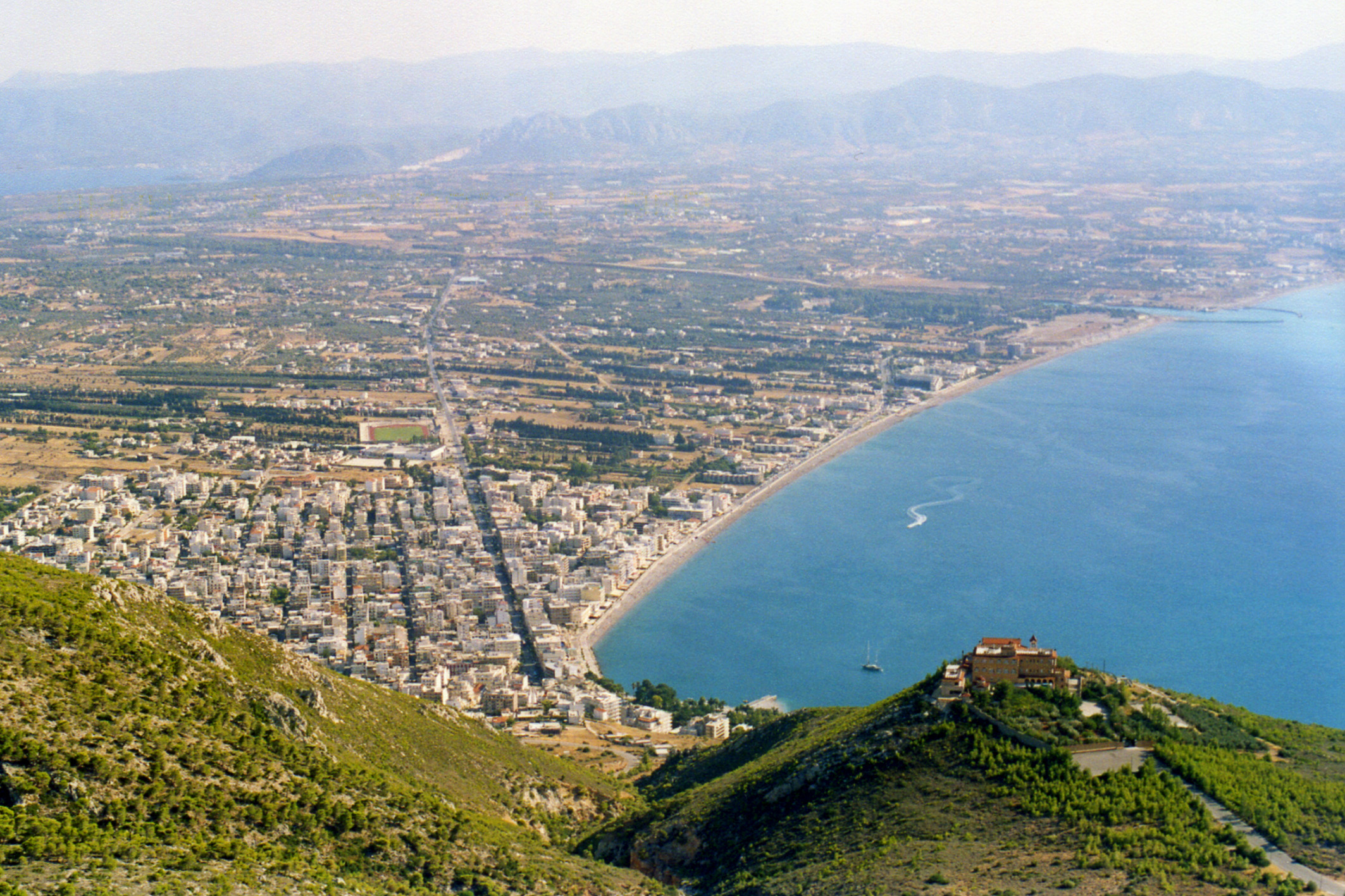 Λουτράκι